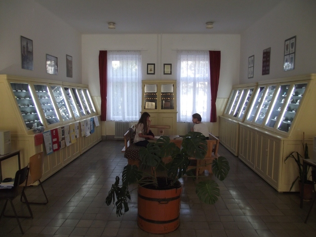 A Szőnyi Pál Ásványgyűjtemény a Debreceni Református Kollégium épületében